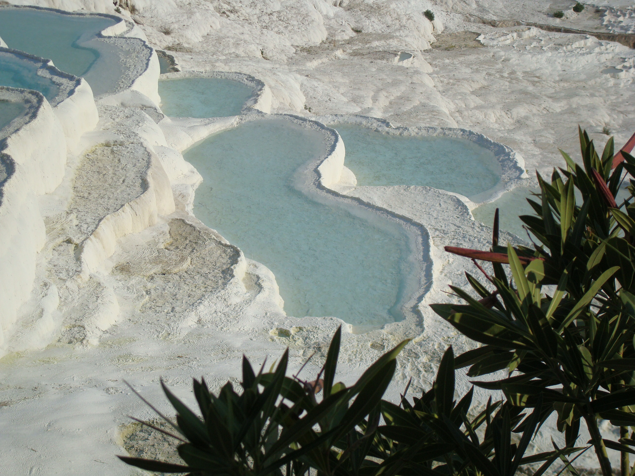 Pamukkale (Le château blanc)